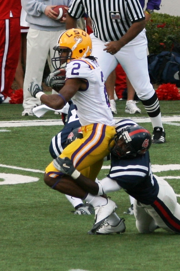 Demetrius Byrd